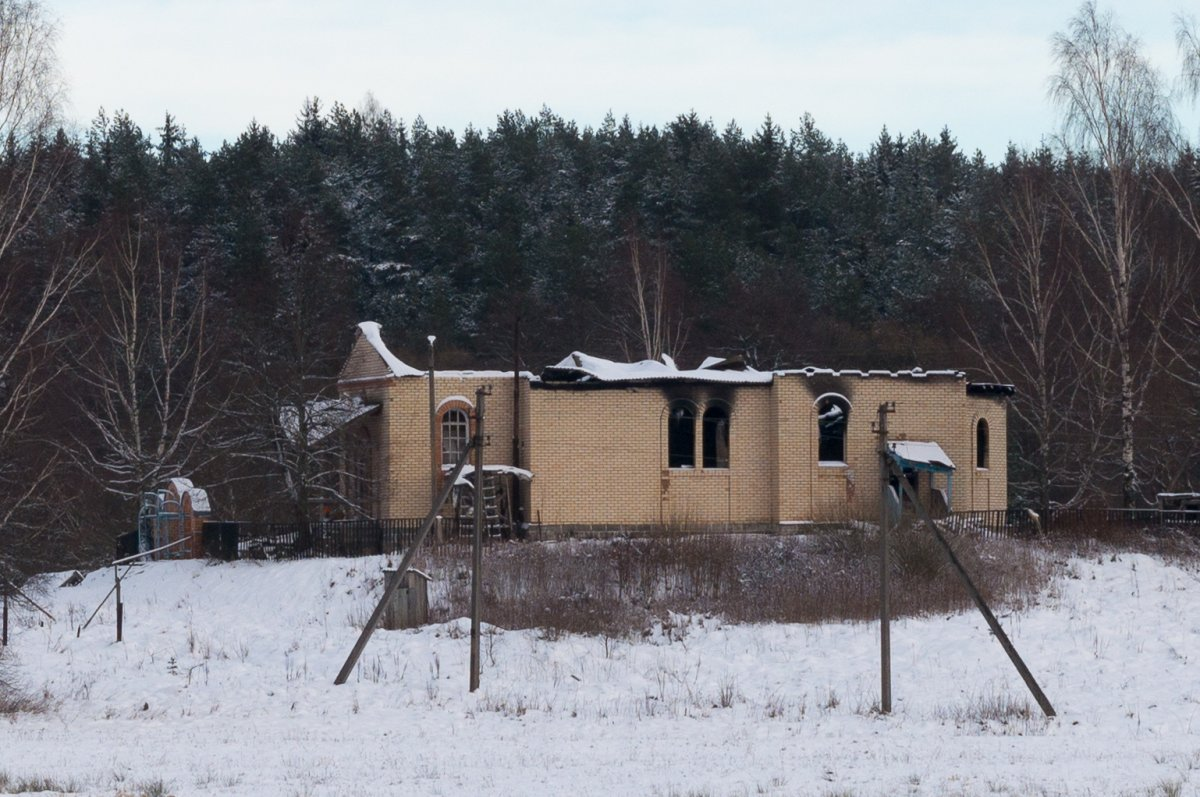 Рэчкі. Свята-Духаўская царква пасля пажару